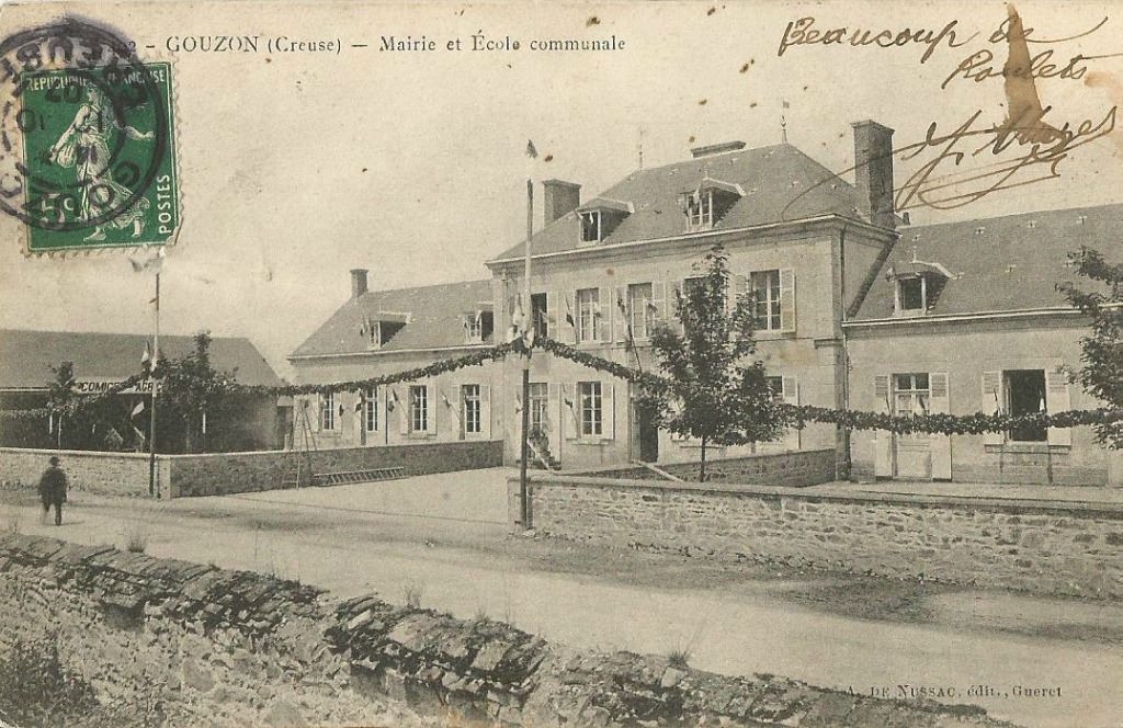 La mairie